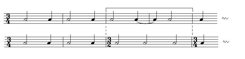 Beispiel einer Hemiolenbildung ---- Literatur : ABC Musik - Allgemeine Musiklehre , Breitkopf & Härtel